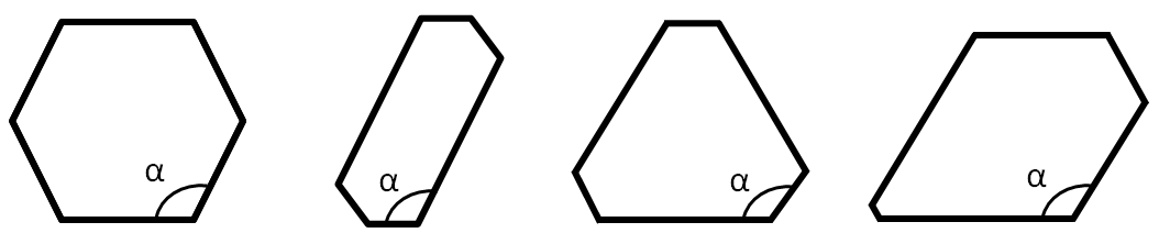 Wet van Steno